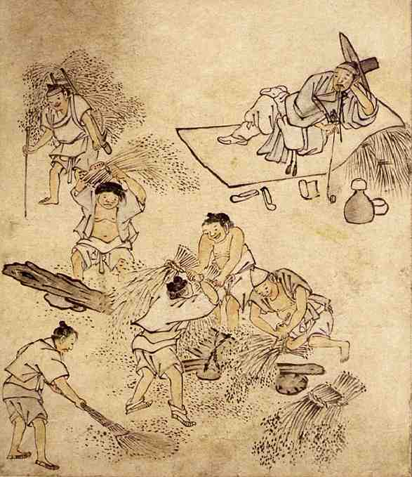 타작(打作), 단원풍속도첩(檀園風俗畵帖)에서 종이에담채, 27cm x 22.7cm, 국립 중앙박물관 소장